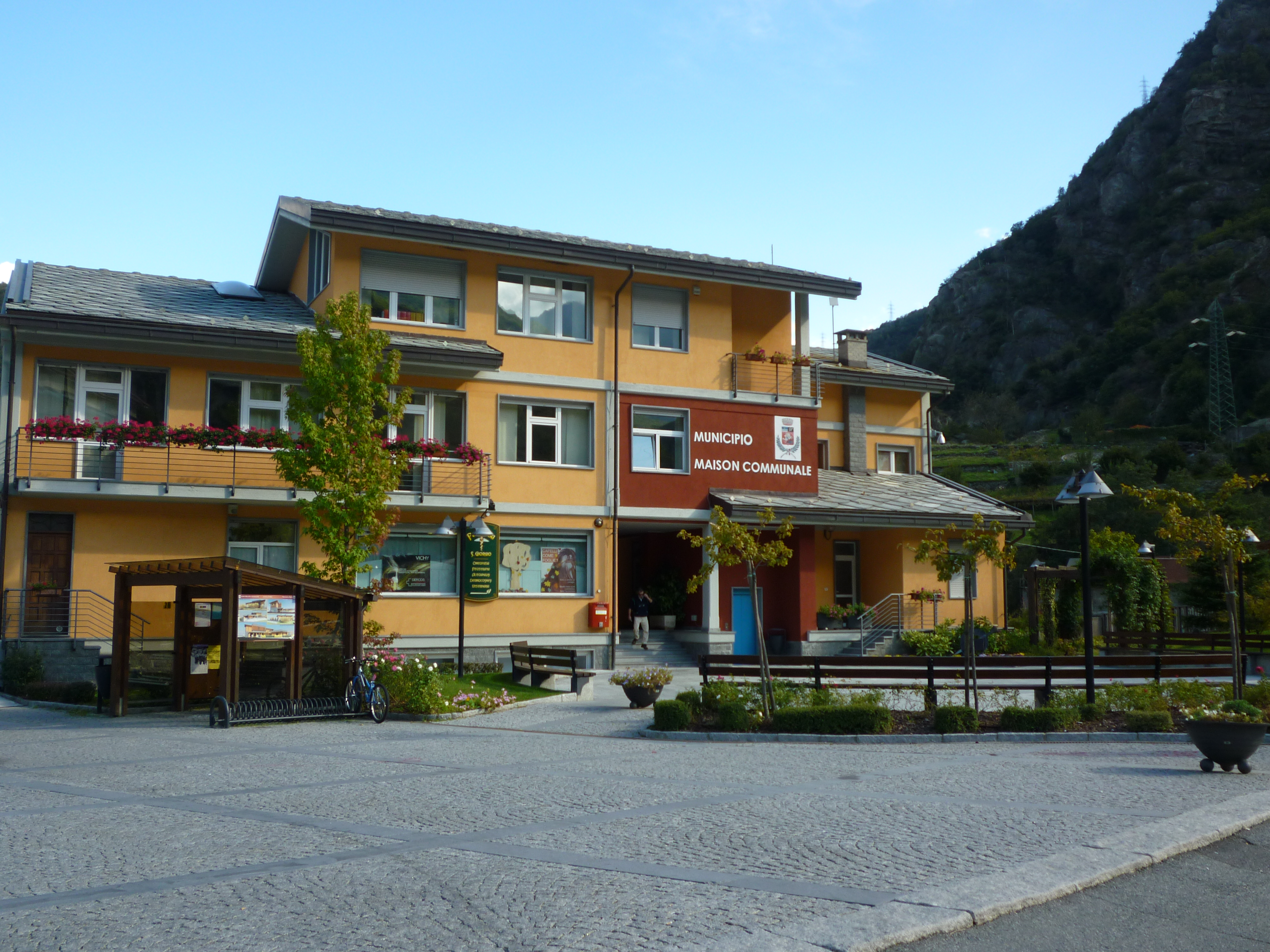 Maison communale de Hône (Vallée d'Aoste - Italie)